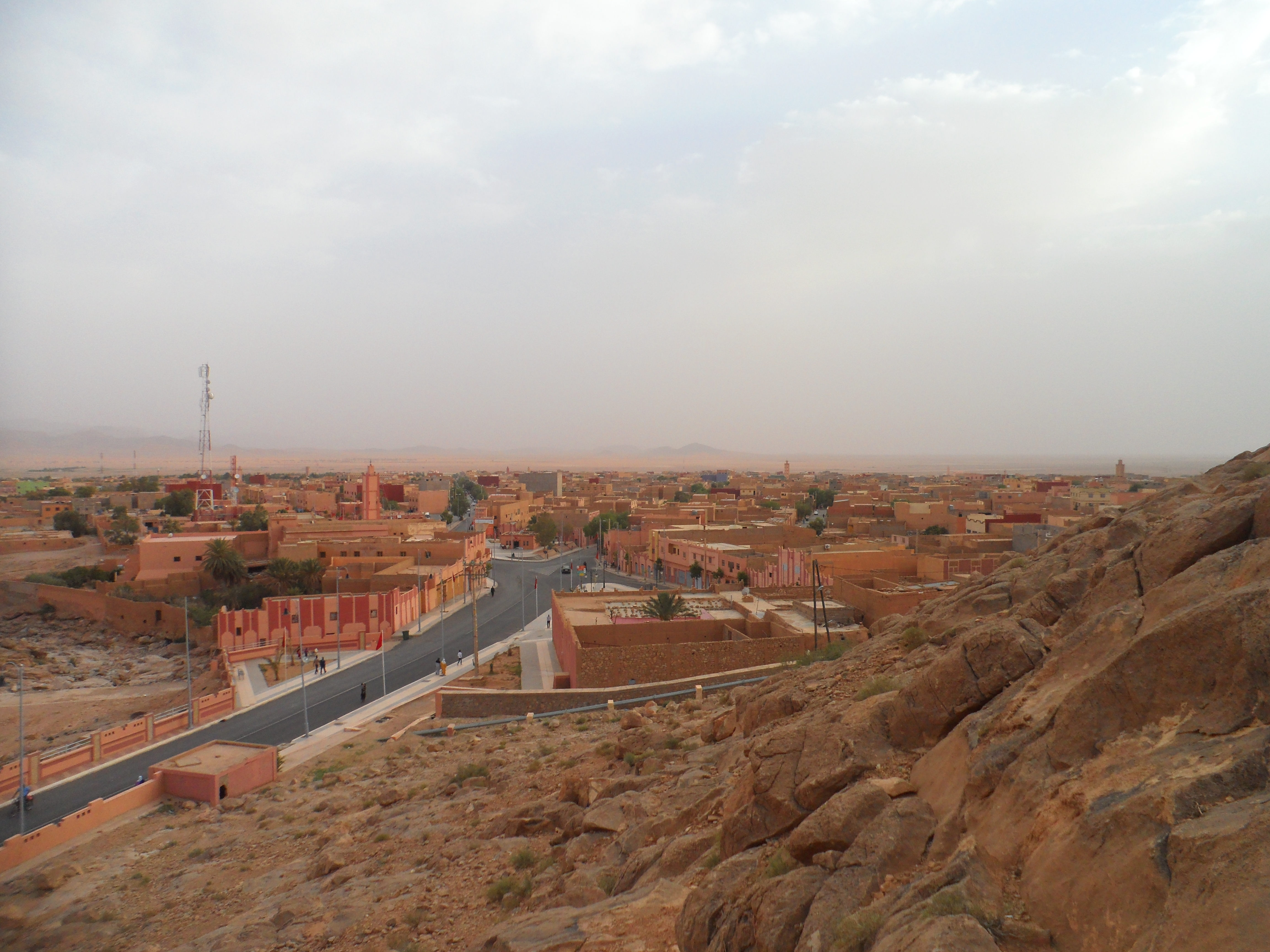 بوعرفة